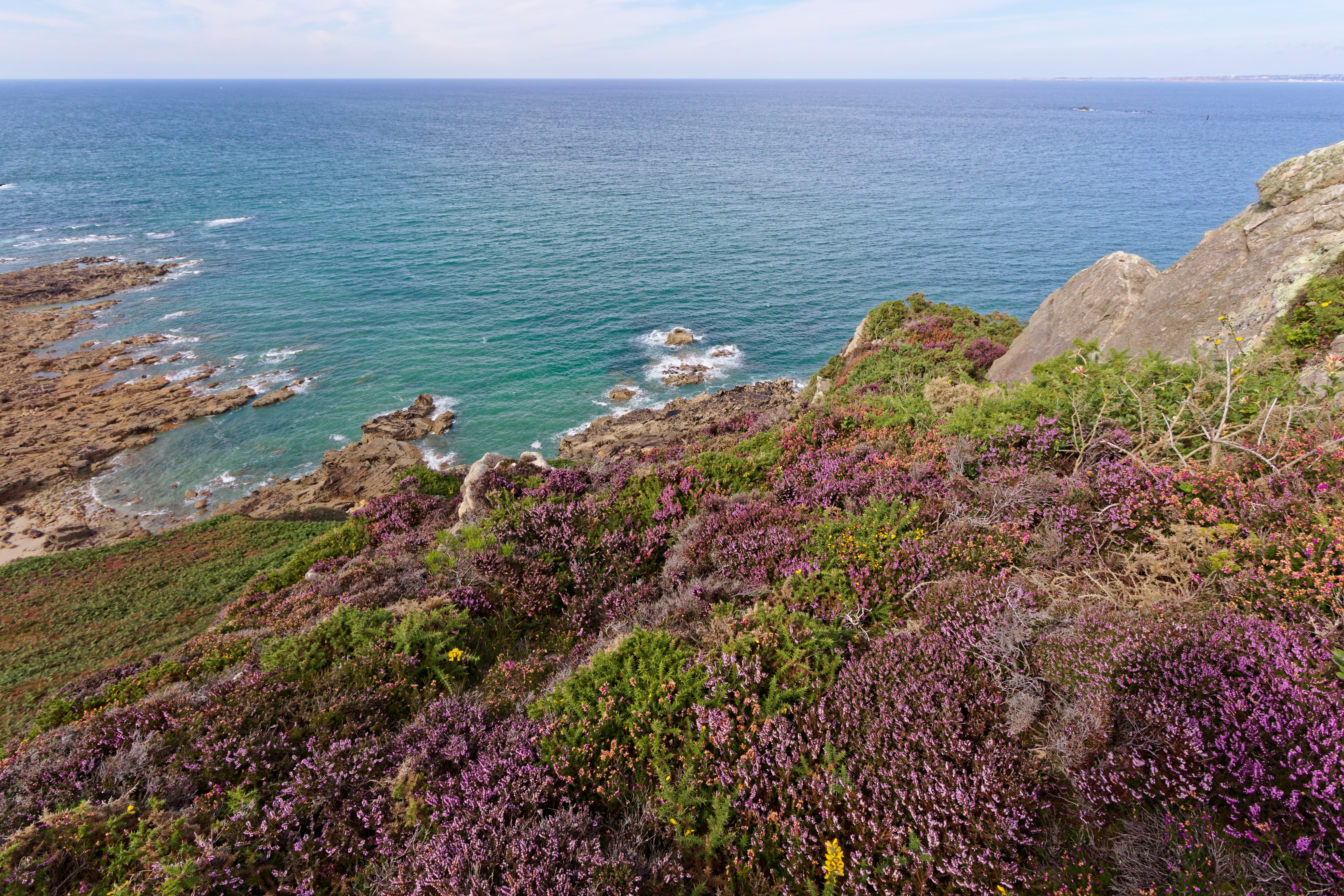 Le GR 34 à partir de la digue de Saint-Jean-du-Doigt jusqu'à Beg ar Fry.